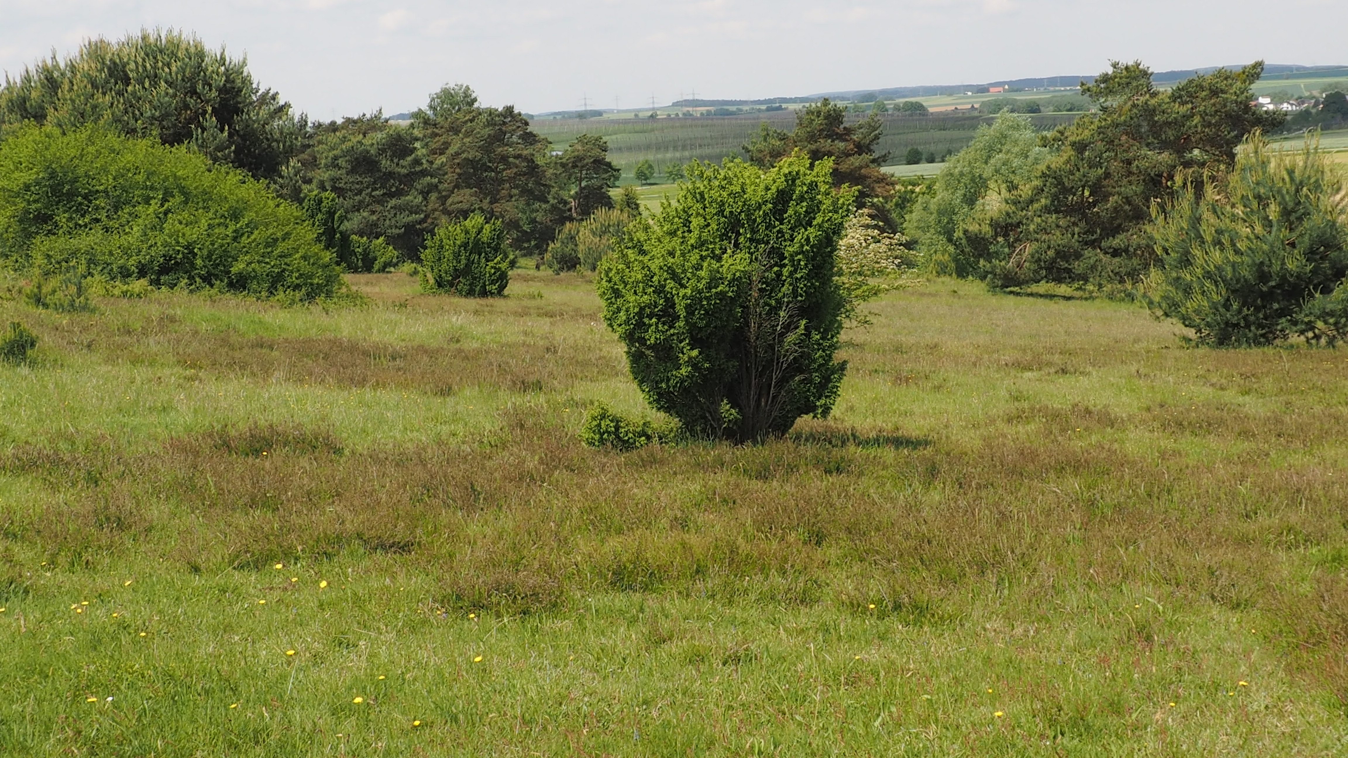 Wacholderbusch umgeben von Heidekraut.